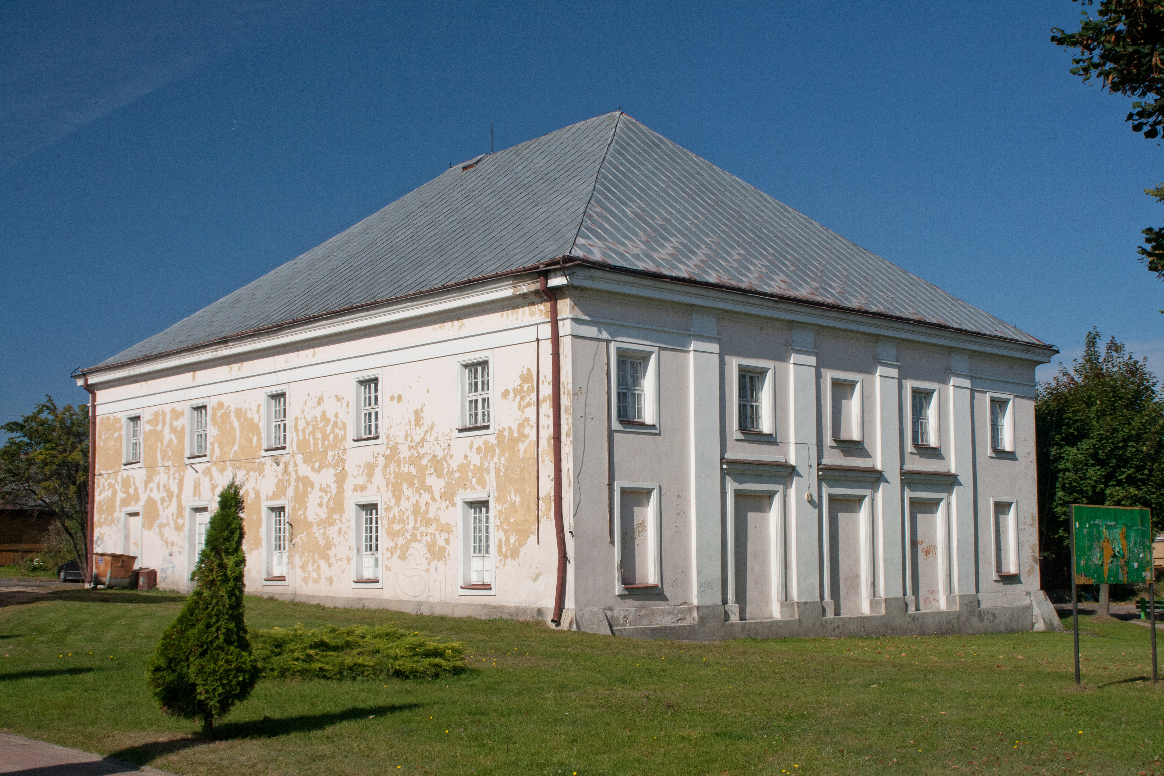 Siemiatycze, Synagoga, ob. dom kultury, mur., 1795-1797, 1961